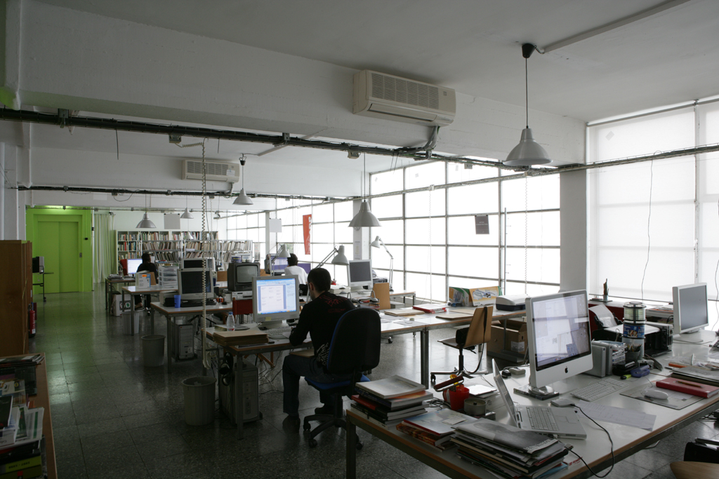 Viver de creadors